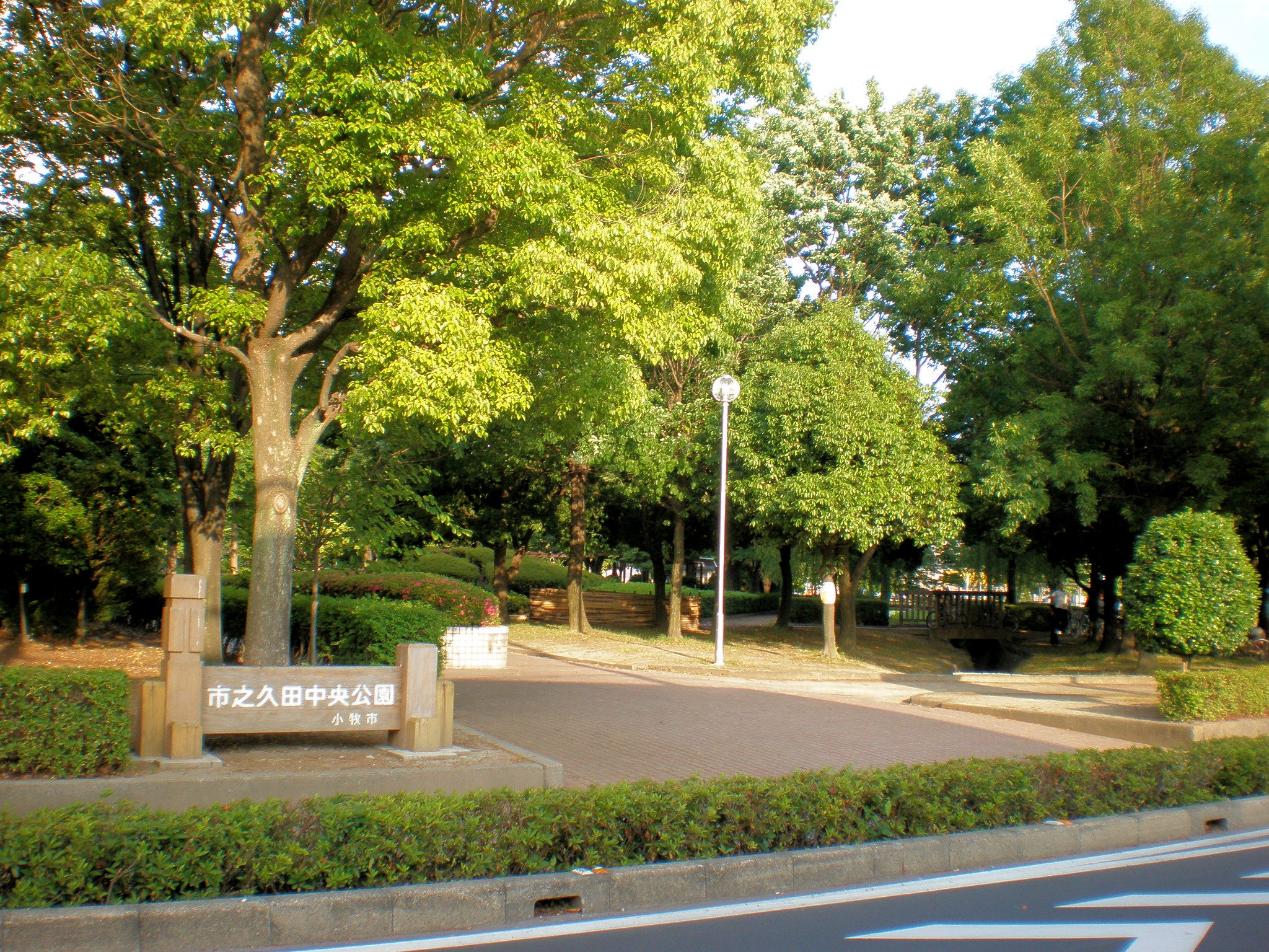 愛知県小牧市にある市之久田中央公園